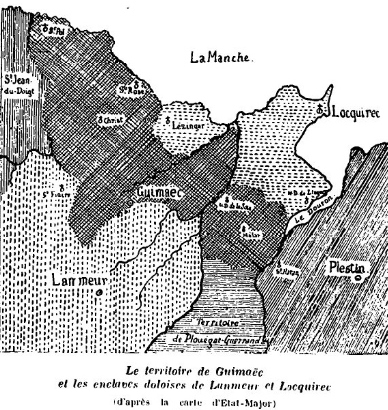 Le territoire de Lanmeur et les enclaves de la trève de Locquirec et de la frairie de Lézingar séparées du reste de cette paroisse par la partie orientale de la paroisse de Guimaëc (René Largillière, ""Les saints et l'organisation chrétienne primitive dans l'Armorique bretonne", 1925).